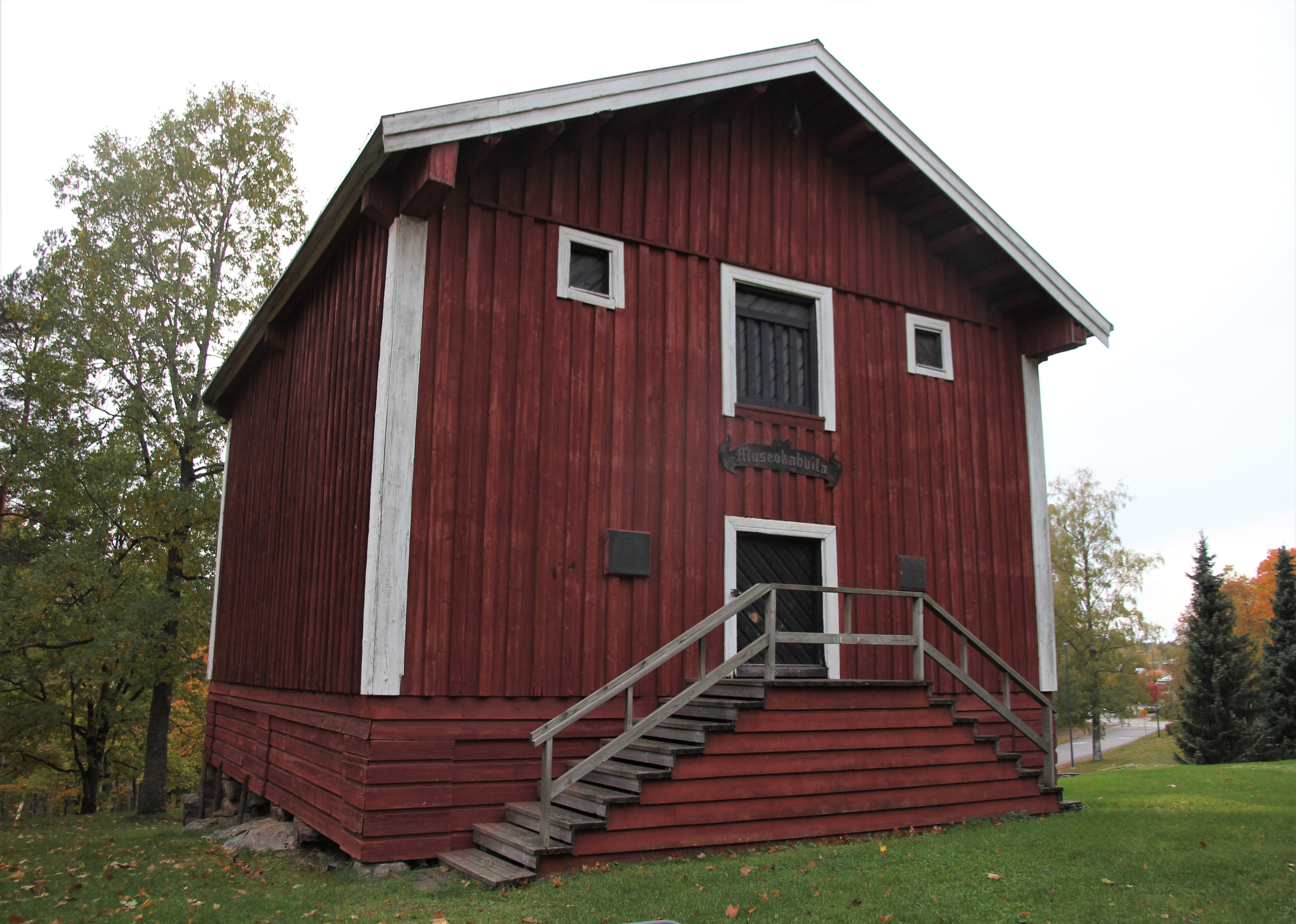 Nurmijärven museokahvila on Nurmijärven vanhassa pitäjänmakasiinissa, Nurmijärven kirkonmäellä, osoitteessa Aleksis Kiven tie 5, Nurmijärven kirkonkylä, Nurmijärvi toimiva paikallismuseo ja kahvila. Kuva vuodelta 2018.